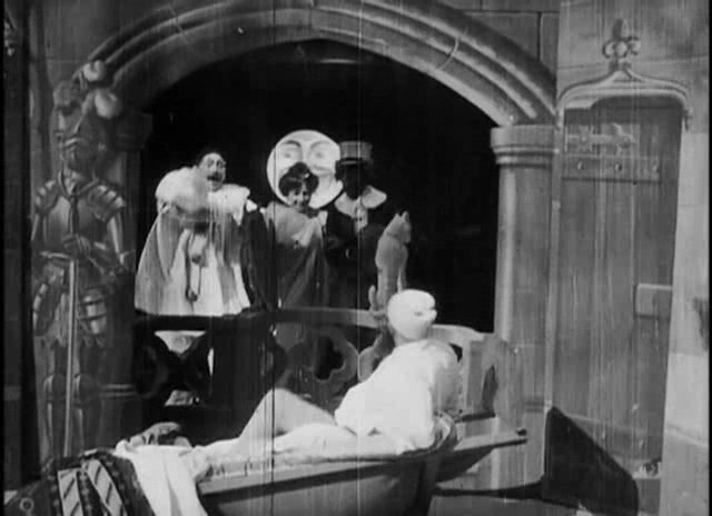 Méliès, Le cauchemar (Star Film 82, 1896)